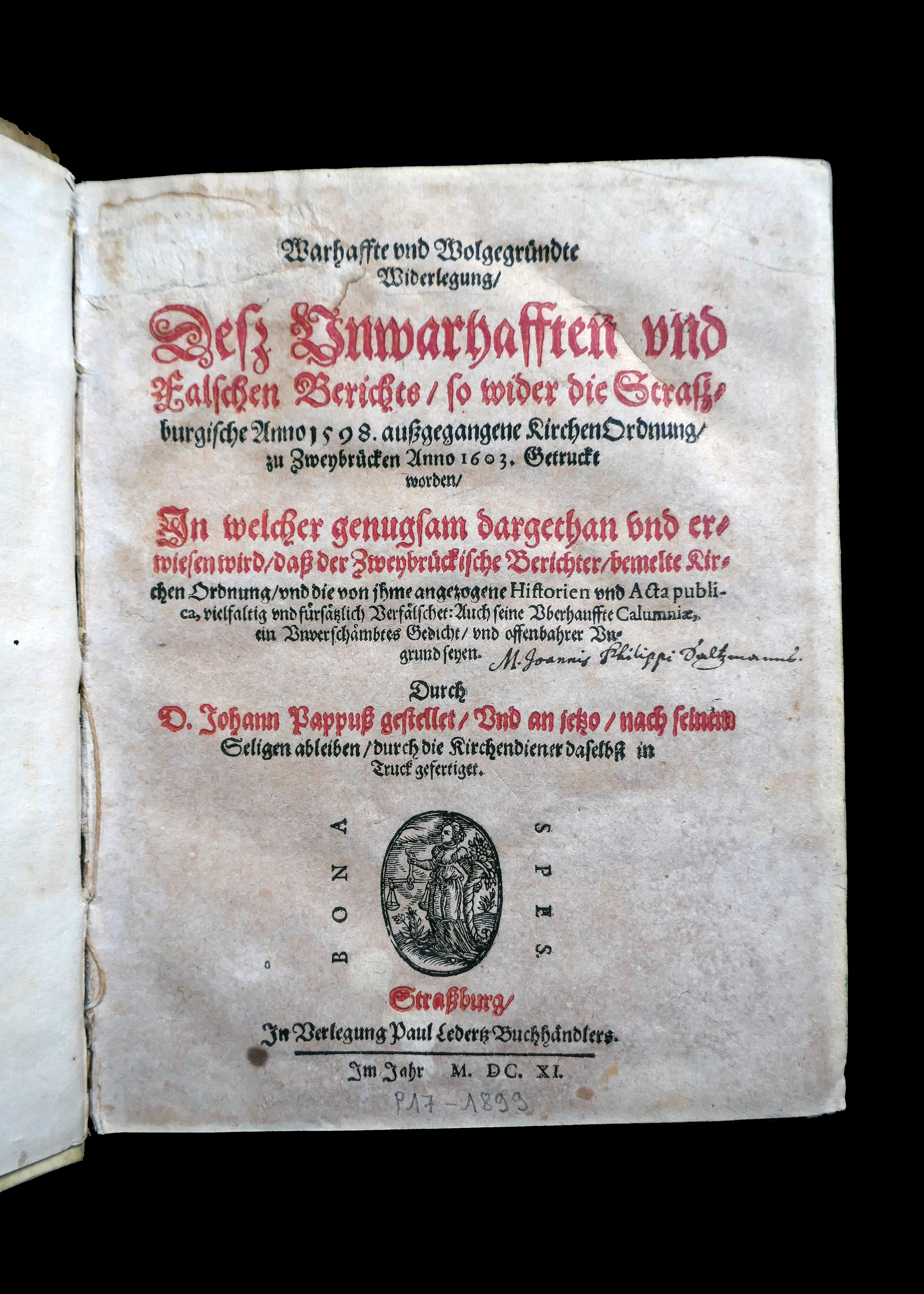 Warhaffte und wolgegründte Widerlegung/ deß unwarhafften und falschen Berichts/ so wider die Straßburgische Anno 1598. außgangene KirchenOrdnung/ zu Zweybrücken Anno 1603. getruckt worden/ In welcher genugsam dargethan und erwiesen wird/ daß der Zweybrückische Berichter/ bemelte Kirchen Ordnung/ und die von ihme angezogene Historien und Acta publica, vielfaltig und fürsätzlich verfälschet: auch seine uberhauffte Calumniæ, ein unverschämbtes Gedicht/ und offenbahrer Ungrund seyen. Durch D. Johann Pappuß gestellet/ und an jetzo/ nach seinem Seligen ableiben/ durch die Kirchendiener daselbst in Truck gefertiget. Publié en 1611 à Strasbourg Médiathèque protestante de Strasbourg [1]